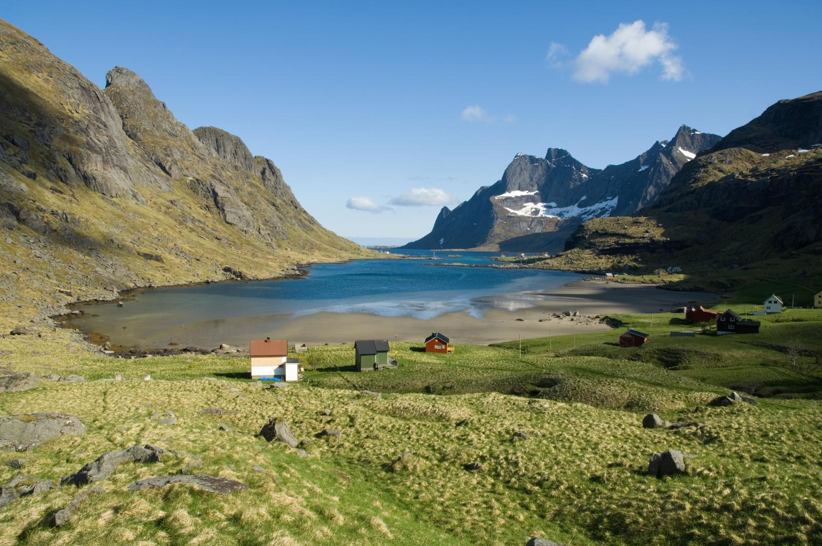 Bunesfjorden in Moskenes, Lofoten, Norway.